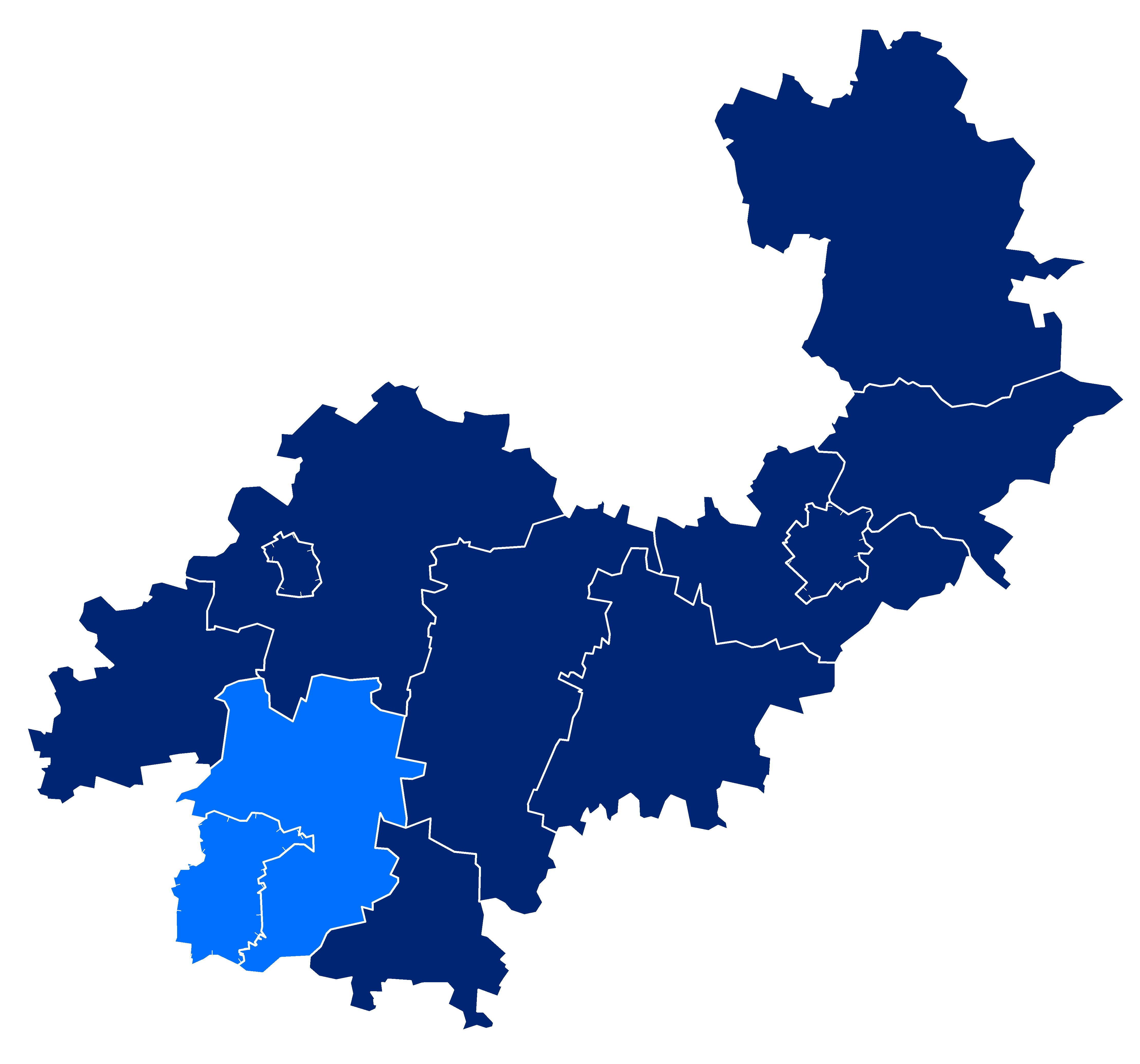 Gmina miejsko-wiejska Sobótka na tle powiatu wrocławskiego